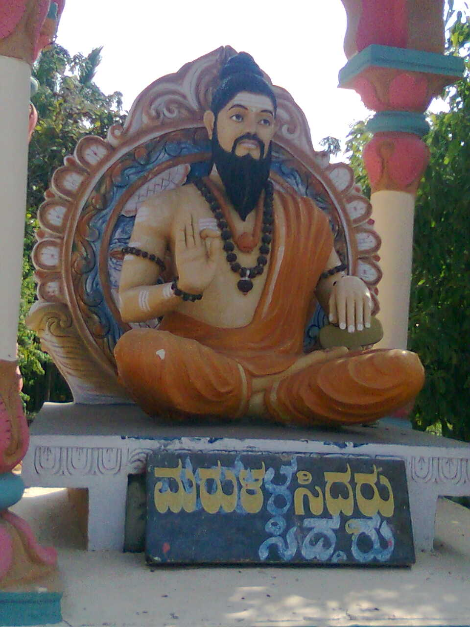 Vishwabandhu Marulasiddha